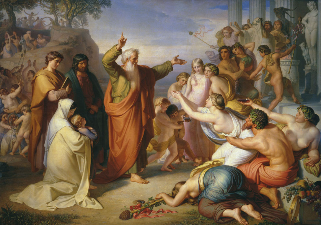 Апостол Иоанн Богослов, проповедующий на острове Патмос во время вакханалий.Изображён апостол Иоанн Богослов, обращающийся с проповедью к нагим и полунагим участникам вакханалий. Некоторые перед ним склоняются.